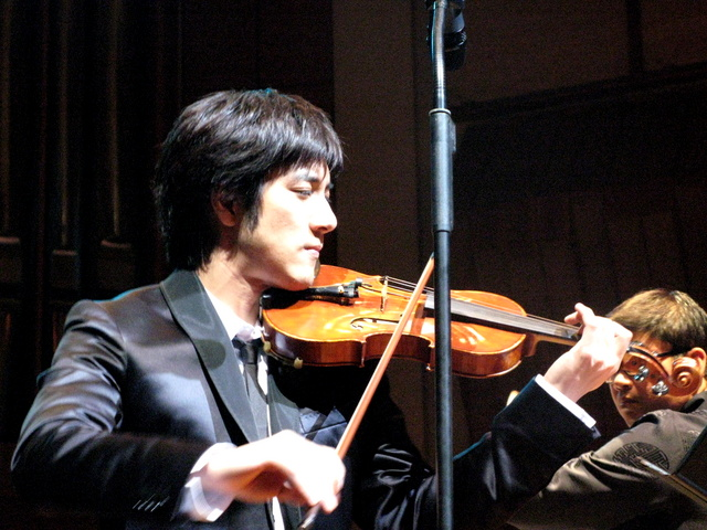 中文（台灣）: 王力宏聖誕節期間在香港與HKPO的合作